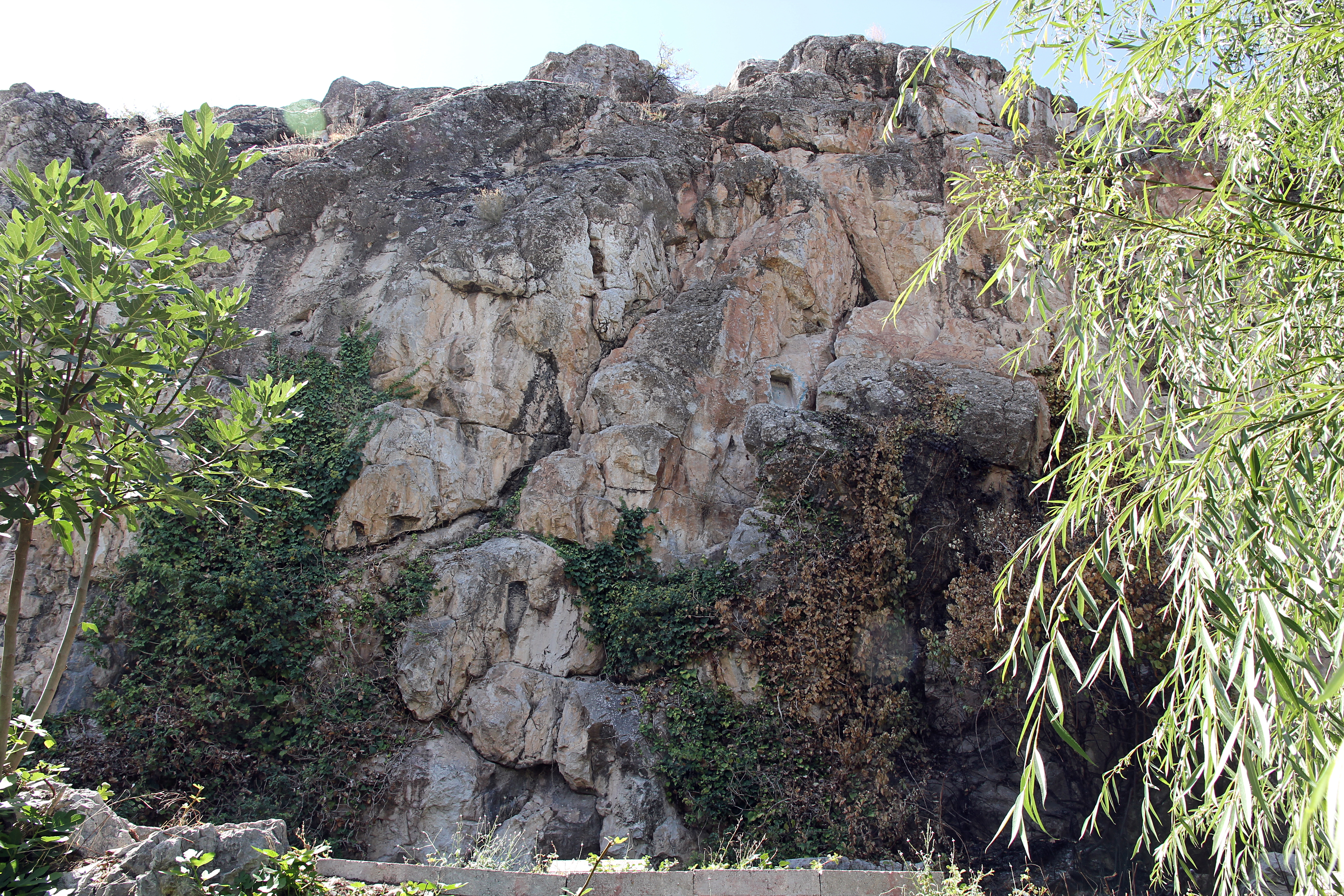 Hethitisches Felsrelief von Hatip bei Konya, Zentraltürkei